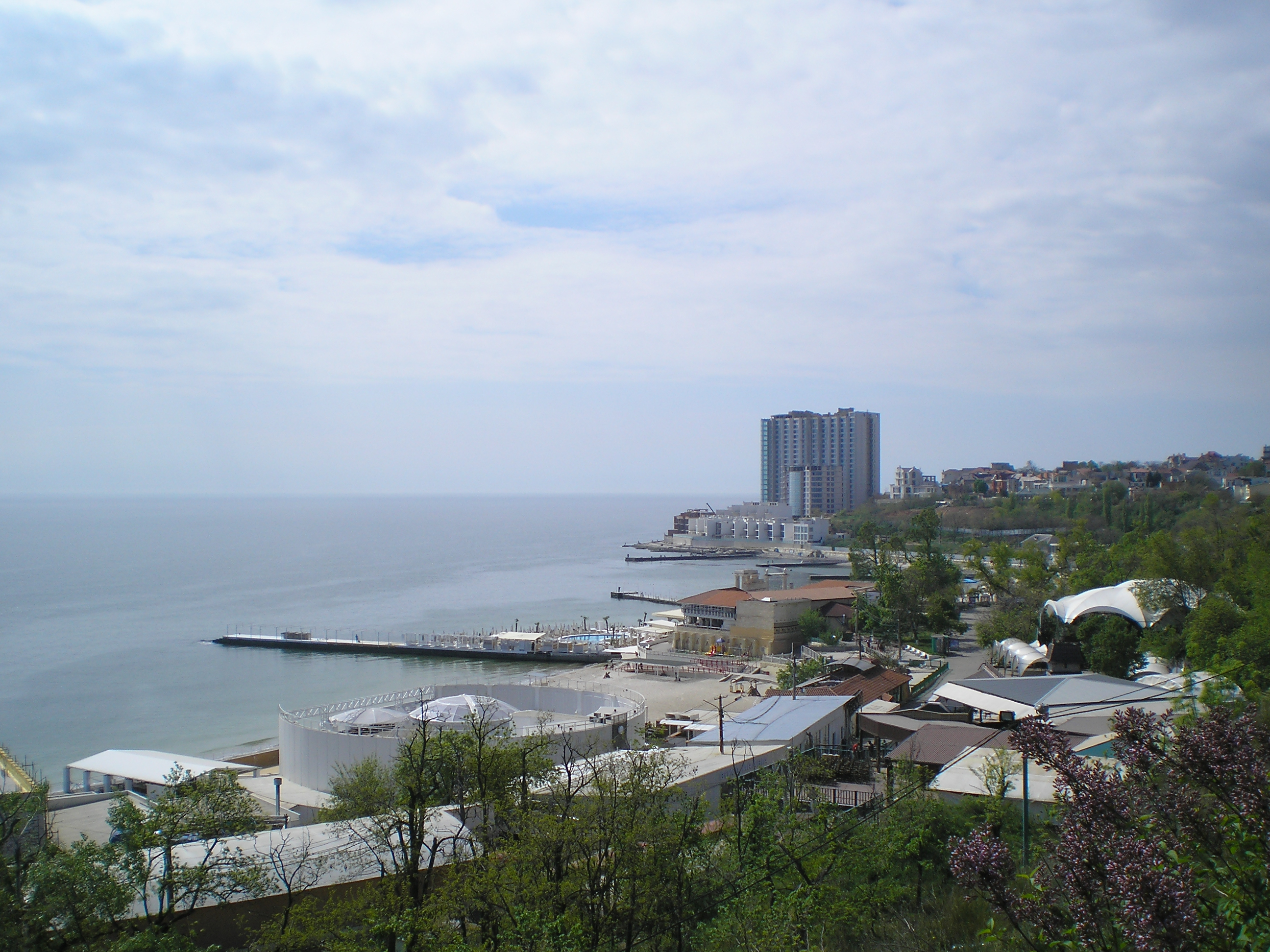 Вигляд на море в Аркадії, Одеса